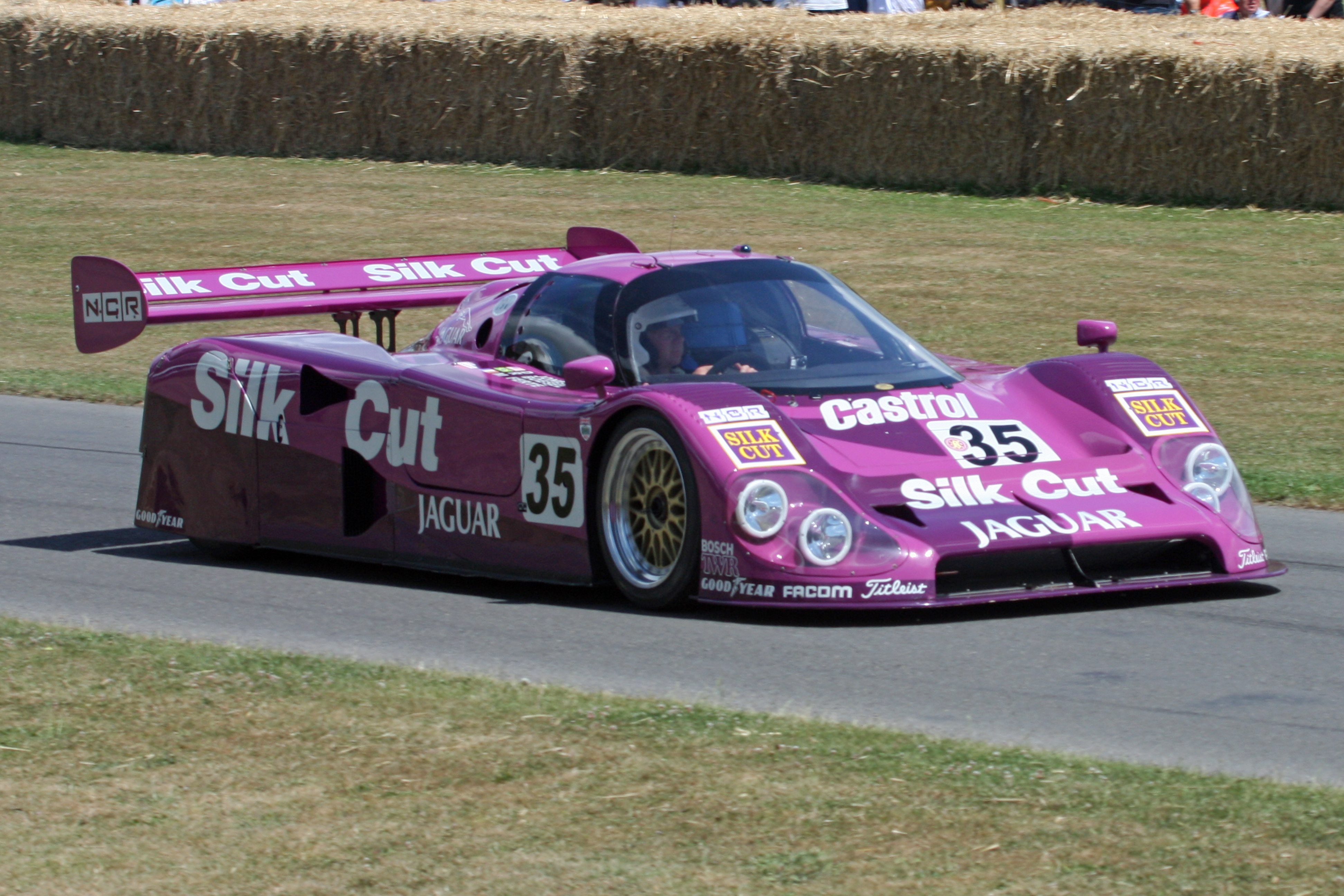 1990 Jaguar XJR12